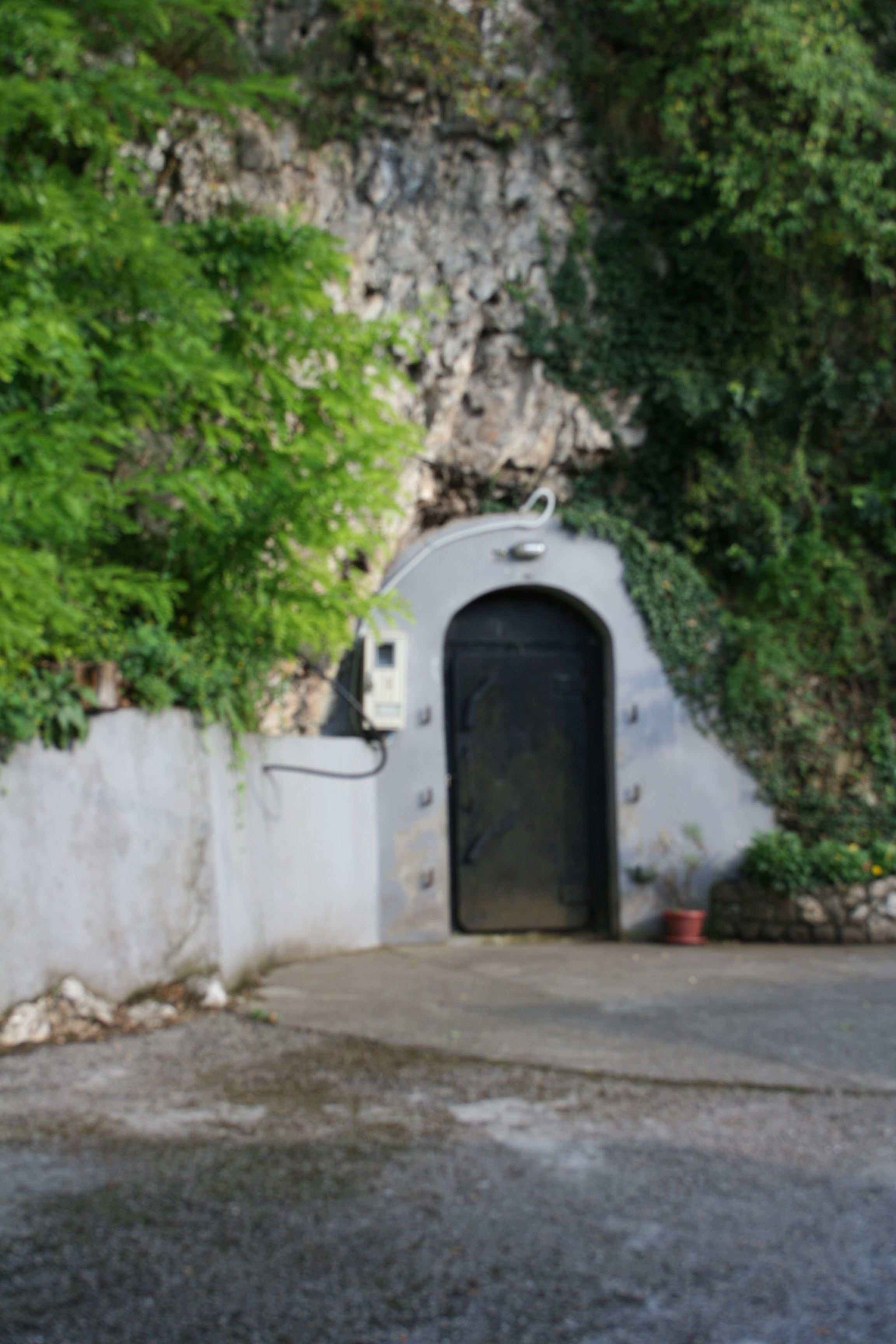 Podzemni grad, Mali Zvornik